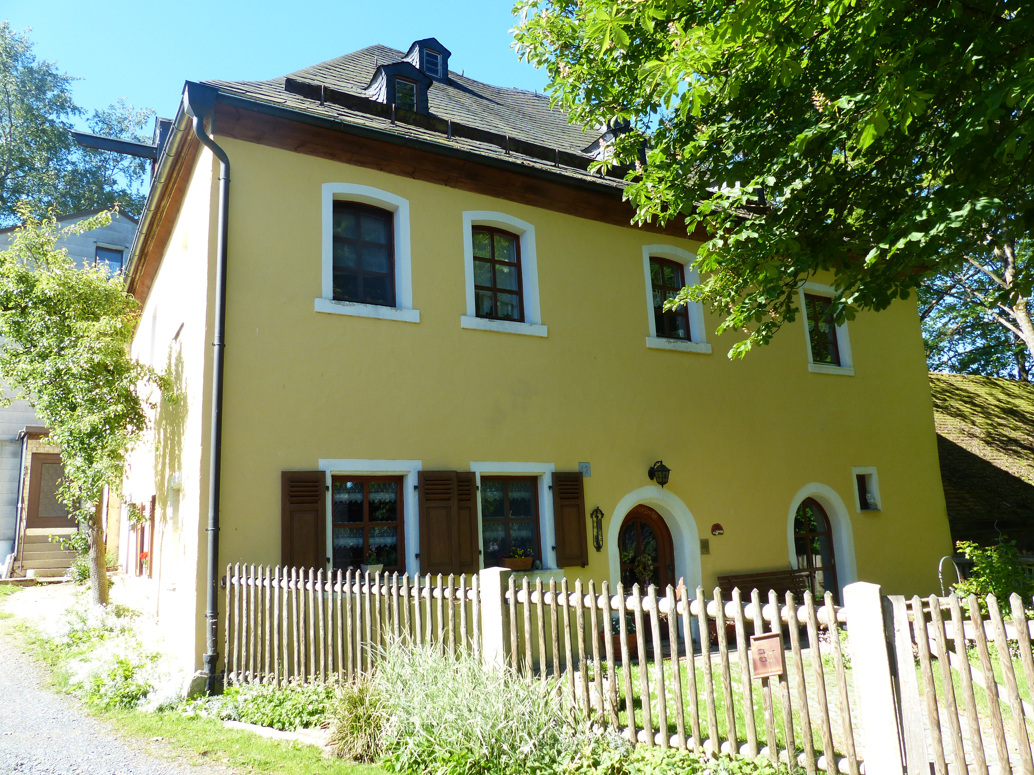 Bilderserie Baudenkmäler in Kirchenlamitz